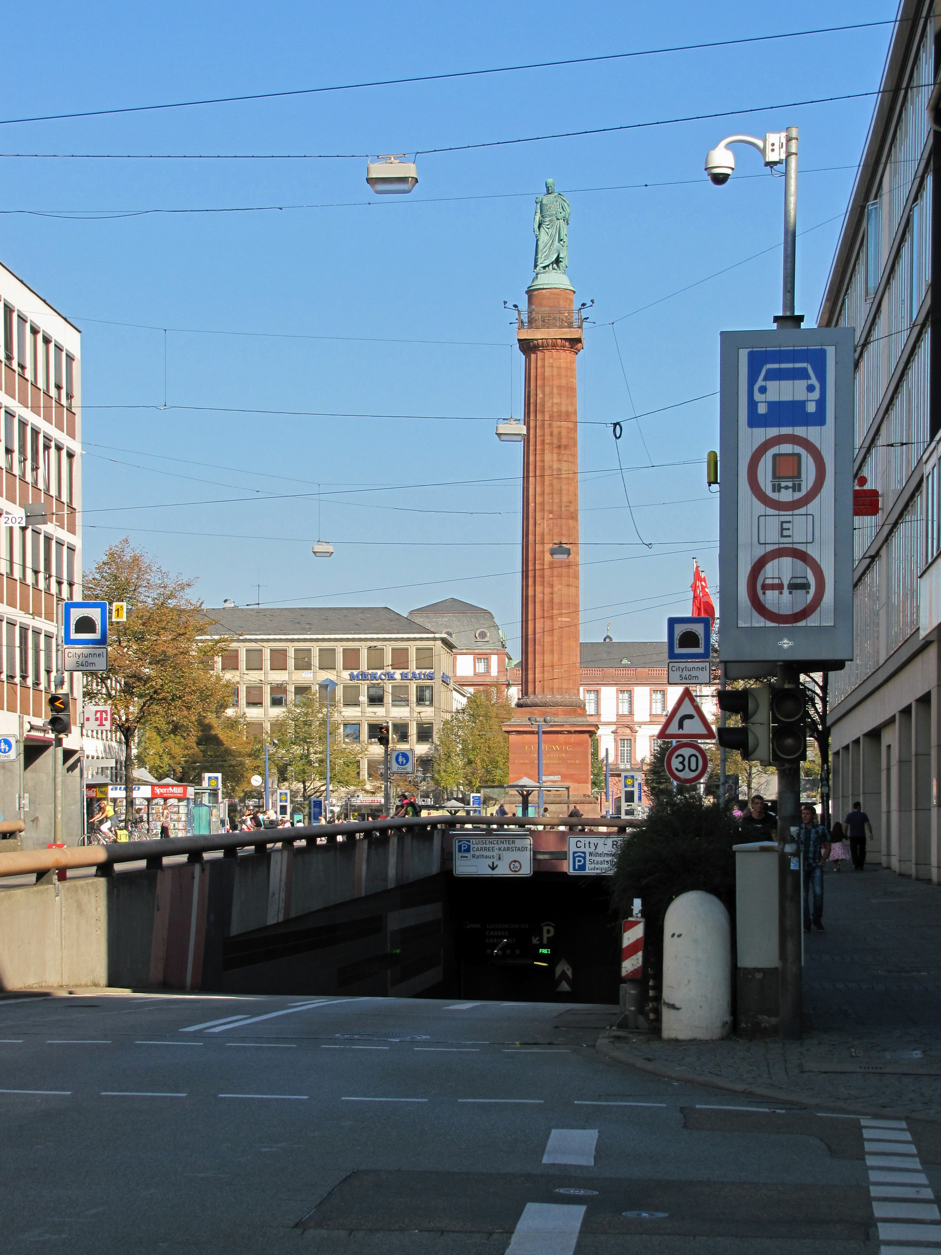 Die Ludwigssaeule auf dem Luisenplatz von der Rheinstrasse aus in Darmstadt.